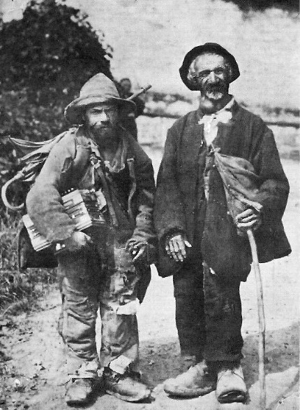 Jenische im Muothathal (Schweiz) um 1890